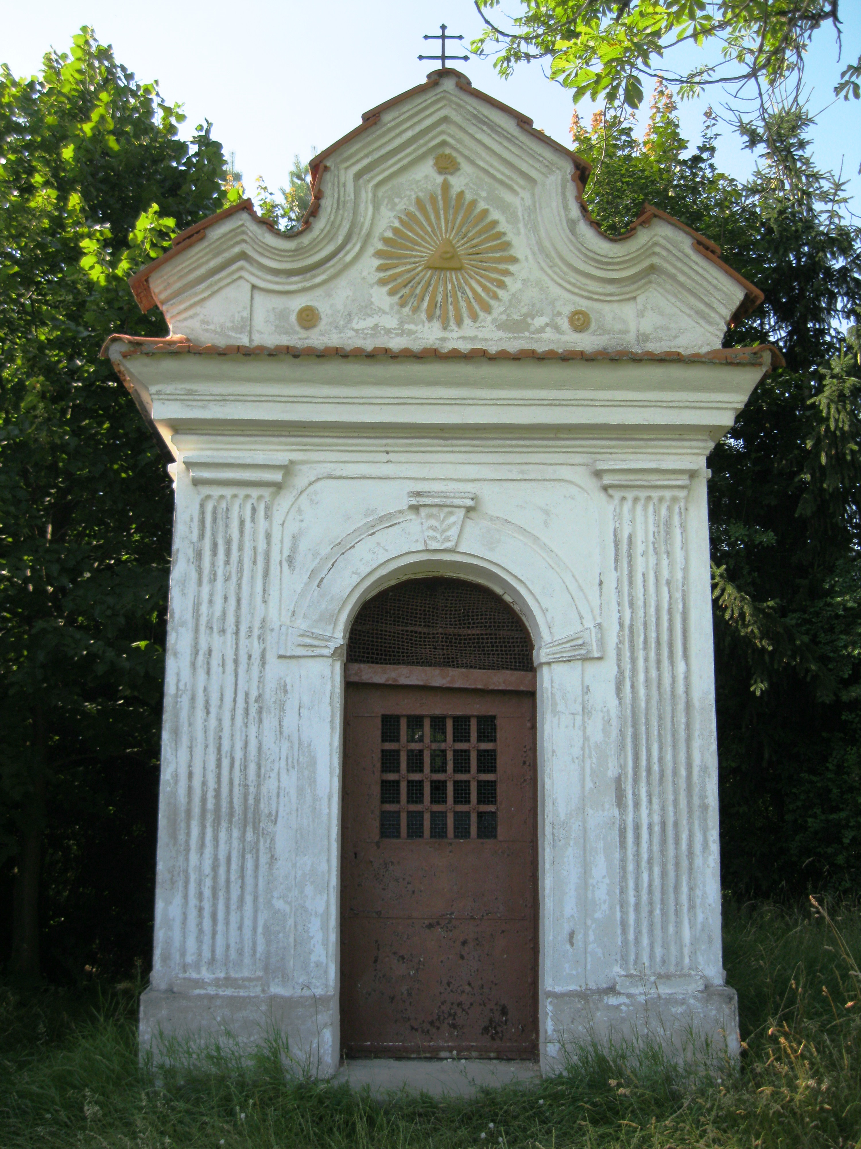 Kaplička (Droždín), při cestě na Sv. Kopeček, Droždín